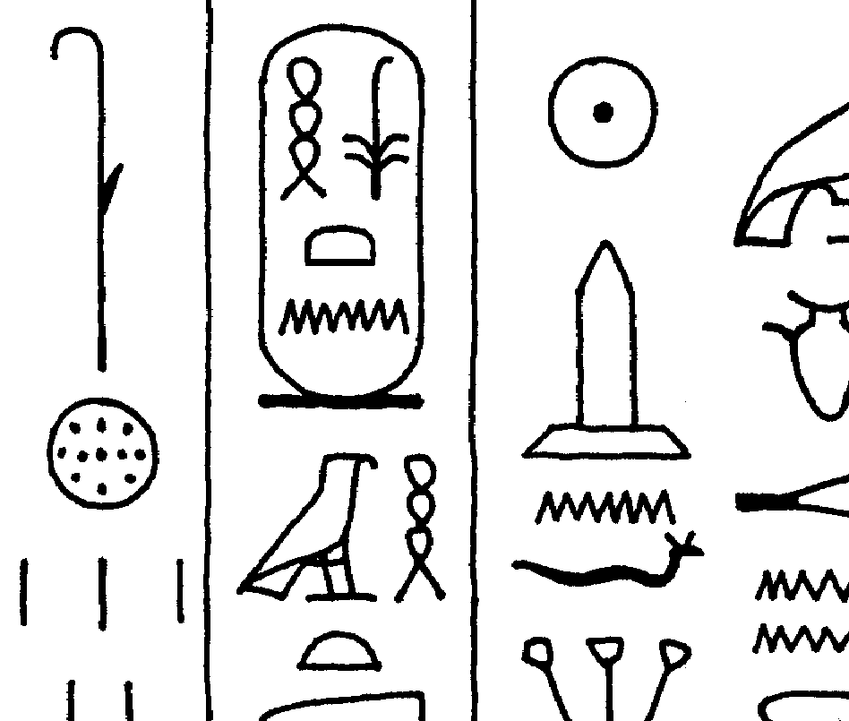 King Huni on the recto of the Palermo stone, rule of Neferirkare in the fifth year - record